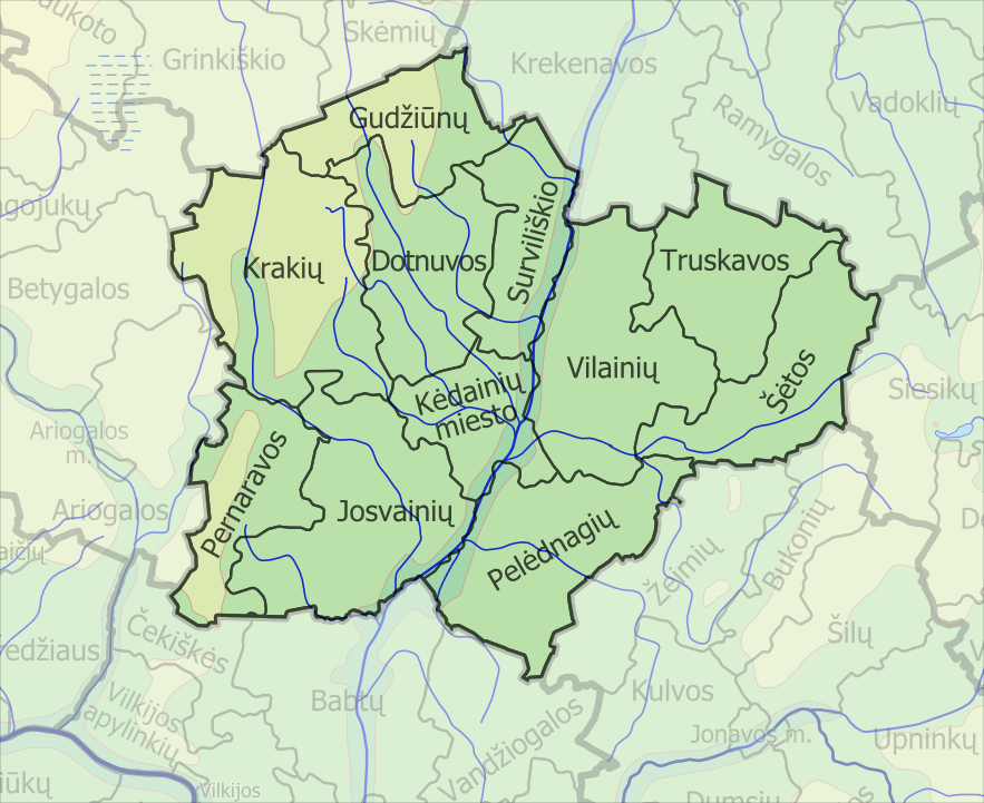 Padaryta iš :image:LietuvosSeniunijos.png